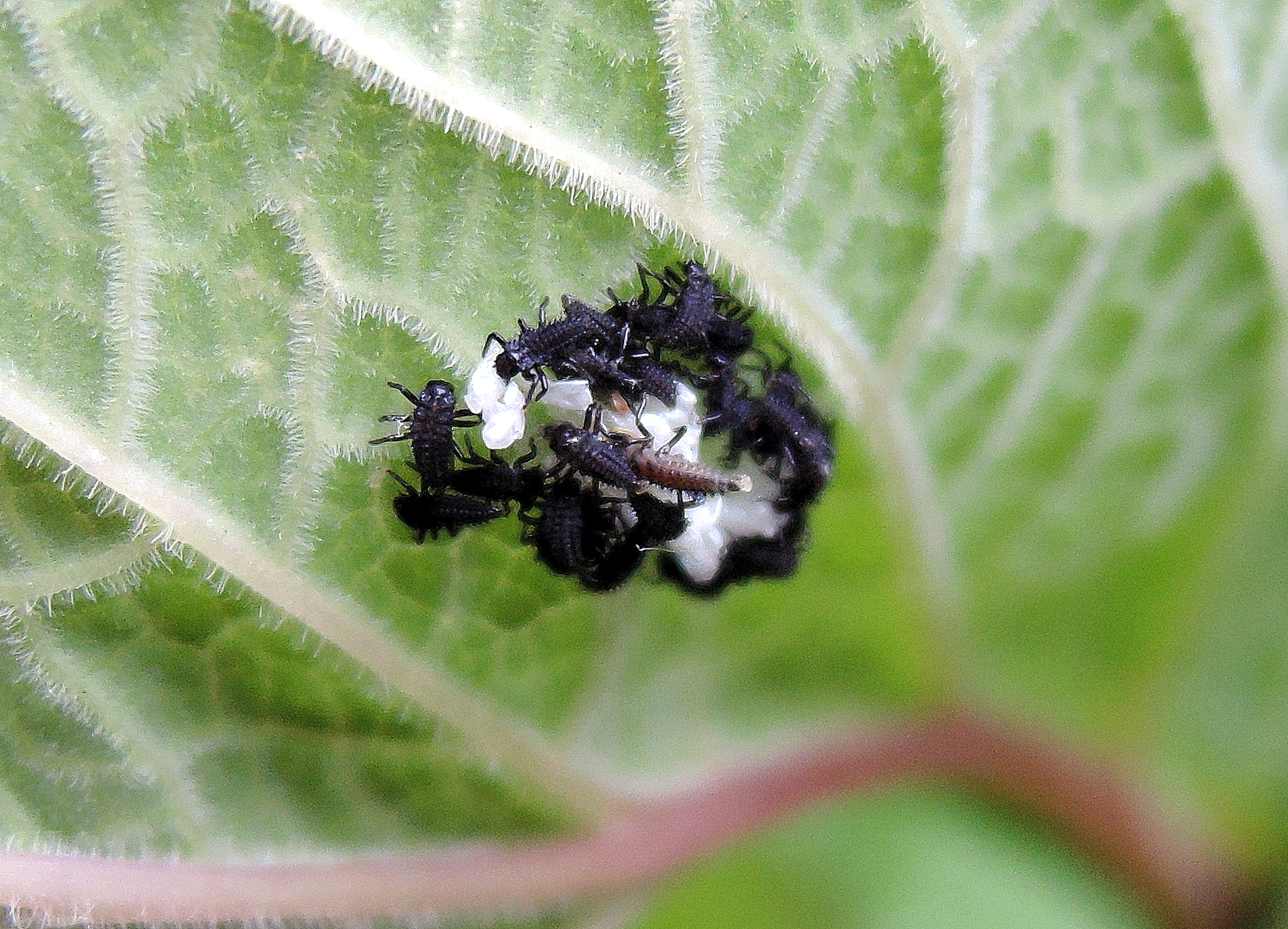 Marienkäferlarve frisch geschlüpt (Mai 2020)